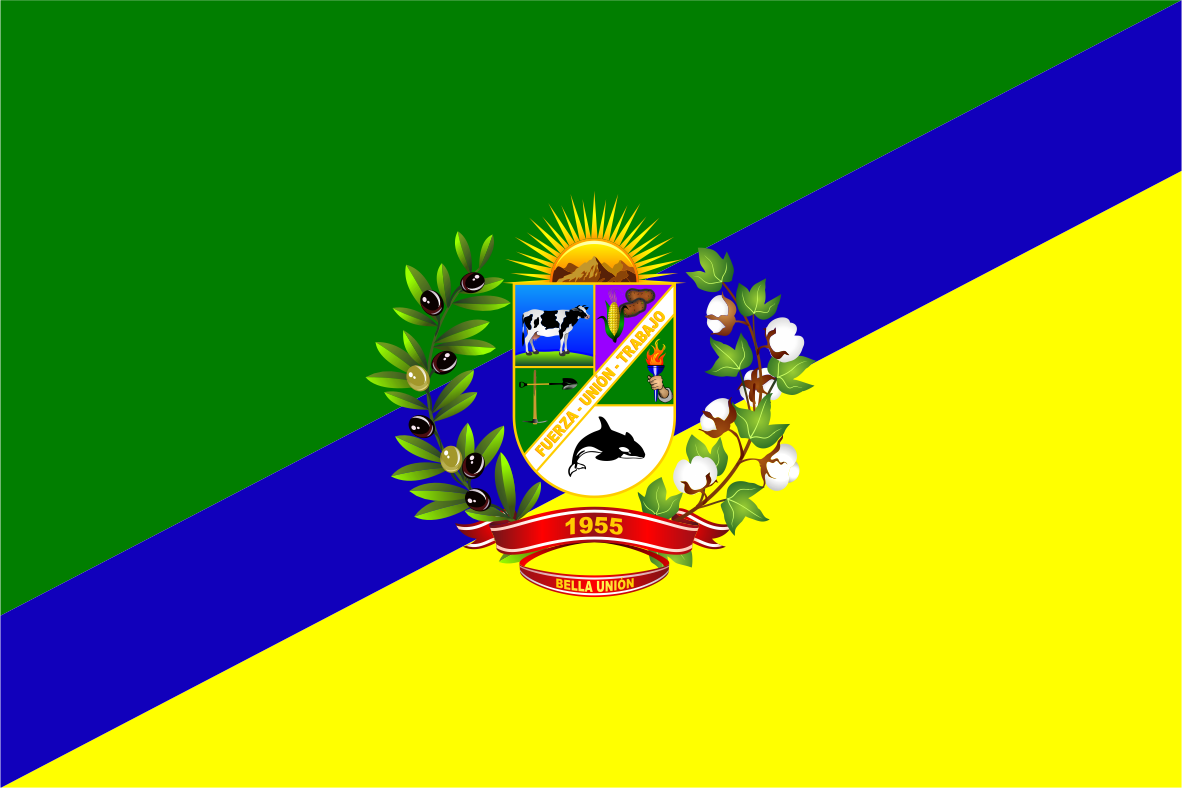 Distrito de Bella Unión - Provincia de Caravelí - Región Arequipa